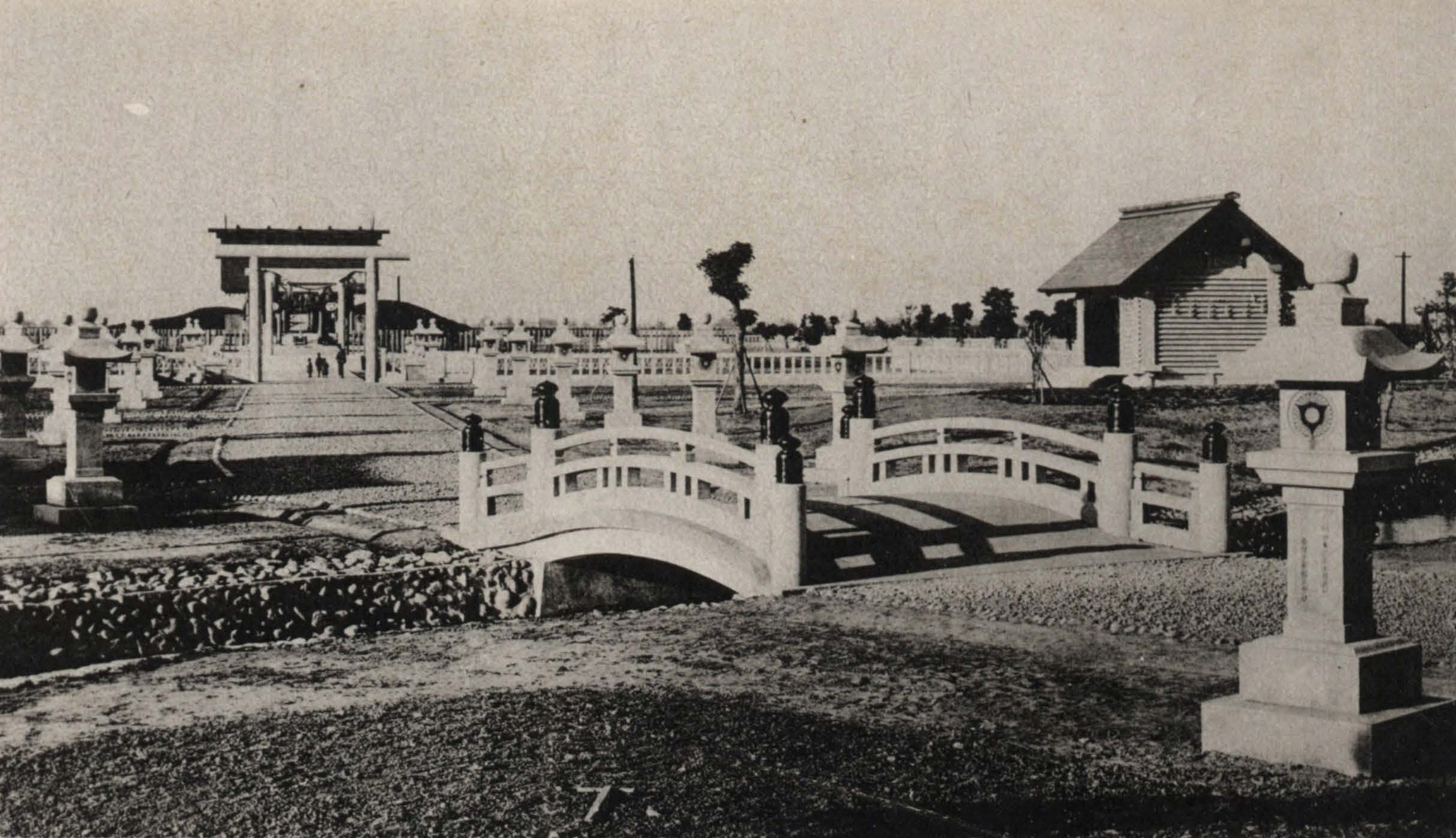 新營神社，翻拍自1939年的《新營郡要覽》